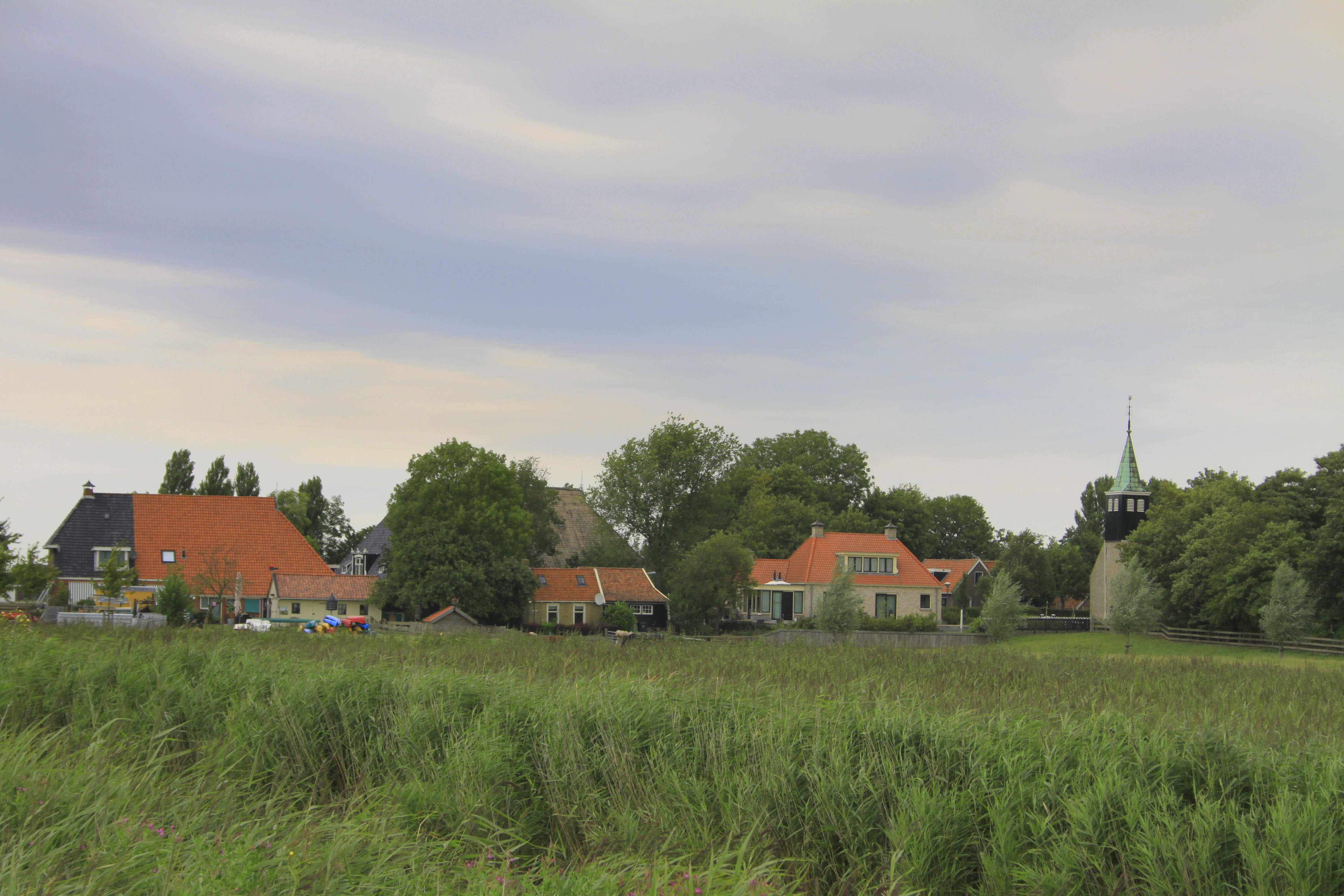 Gaast, een klein dorp aan de Zeedijk, de dijk van het huidige IJsselmeer. Gaast was dan ook vroeger een vissersdorp.